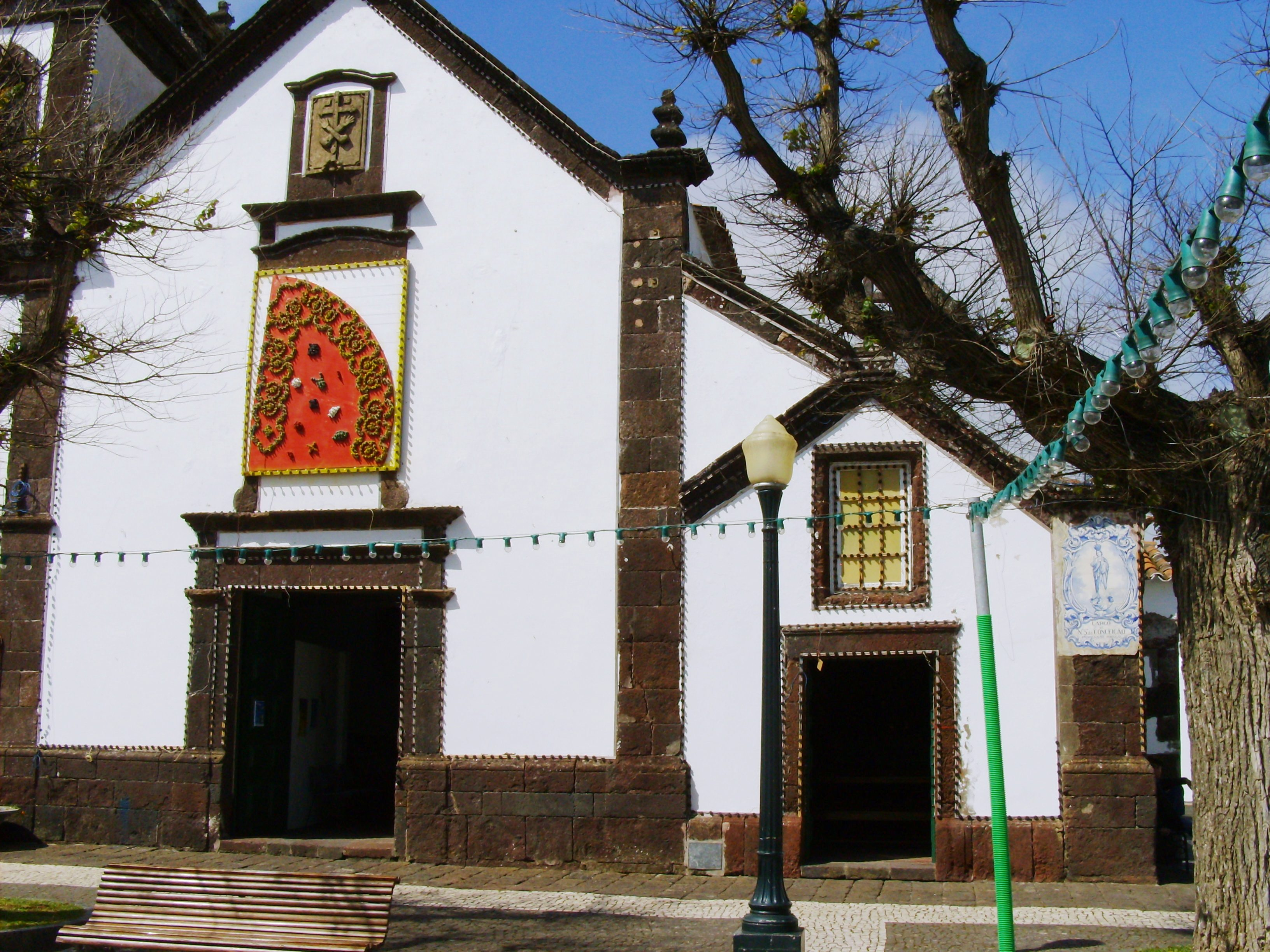 Igreja de Nossa Senhora da Vitória, Vila do Porto, Ilha de Santa Maria (Açores), Portugal.